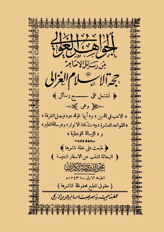 غلاف «الجواهر الغوالي من رسائل الإمام حجة الإسلام الغزالي» - طبعت على نفقة محيى الدين صبري الكردي، المطبعة العربية لصاحبها خير الدين الزركلي، القاهرة، الطبعة الأولى ١٣٤٣ هـ.